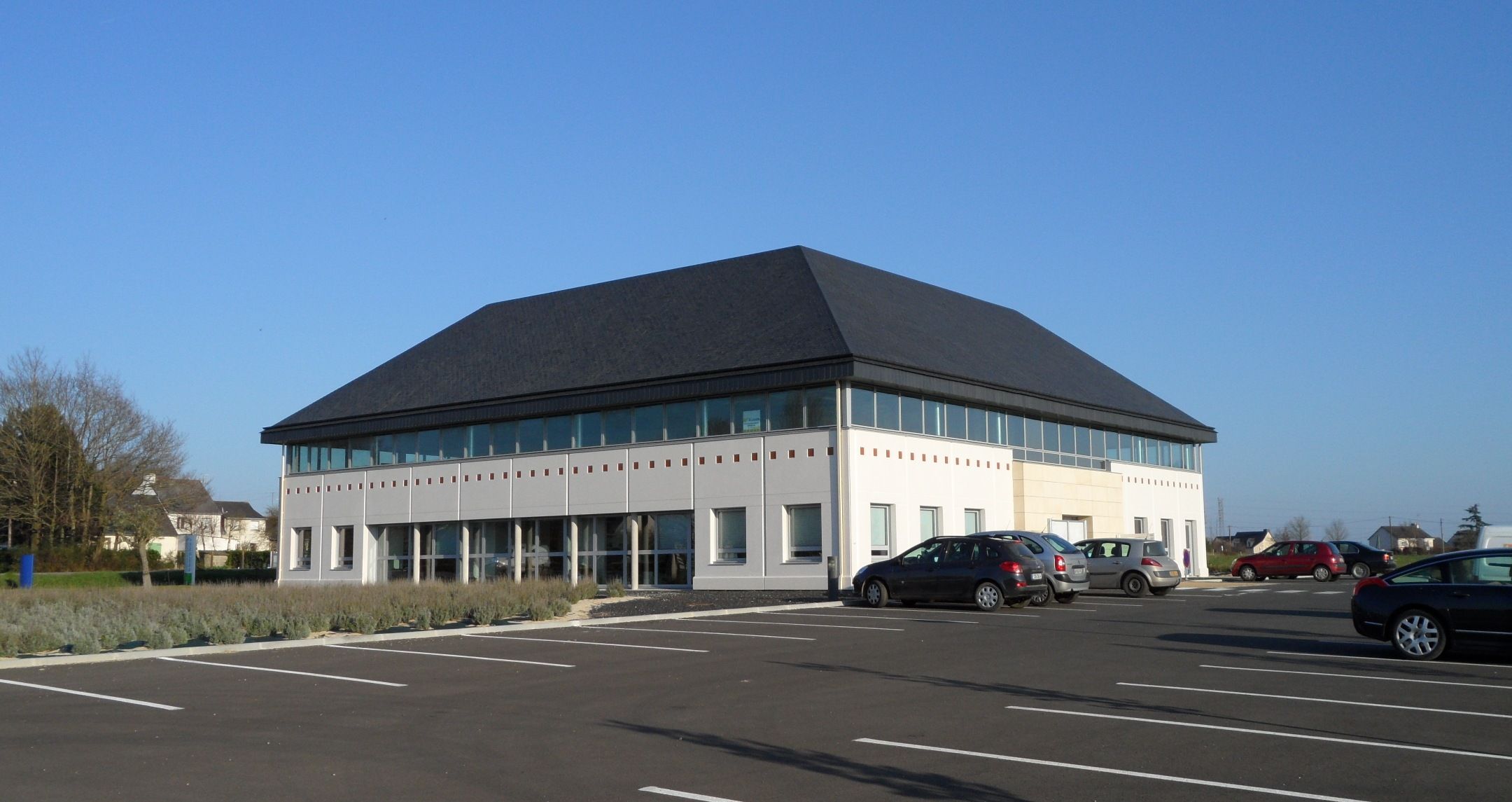 Siège de la Communauté de Communes du secteur de Derval (CCSD), situé au nord du département de la Loire-Atlantique.